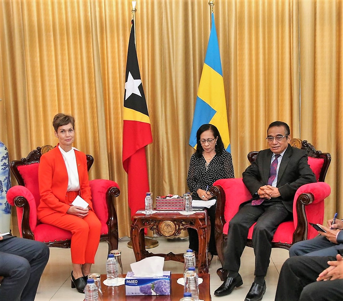 Die schwedische Botschafterin Marina Berg übergibt ihre Akkreditierung an Osttimors Präsident Francisco Guterres